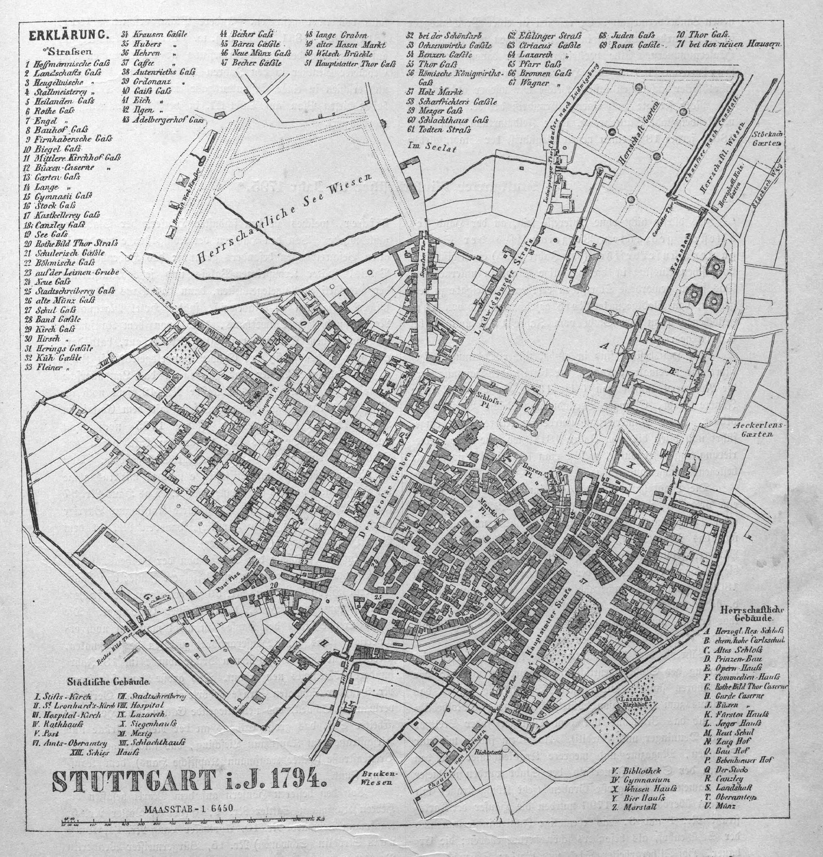 Christian Friedrich Roth (Zeichnung); Gottlieb Friedrich Abel (Stich): Stuttgart i. J. 1794, Stadtplan, 1794.